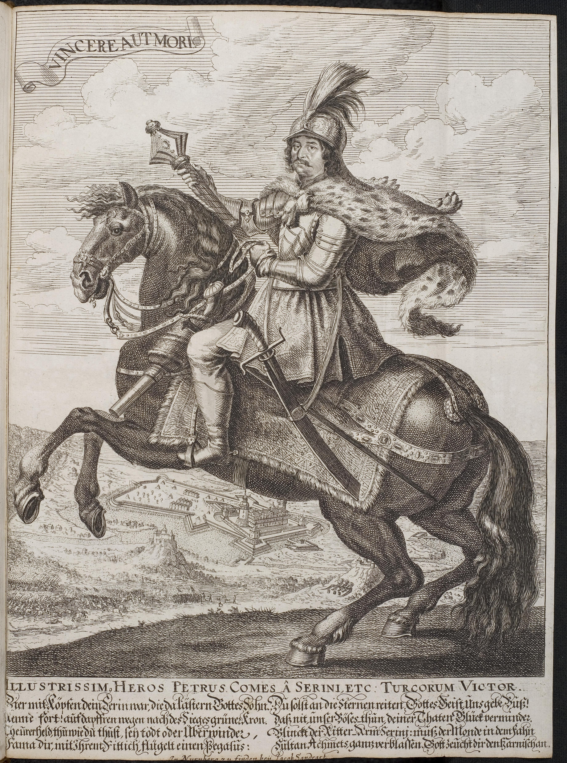 Grafik aus dem Klebeband Nr. 2 der Fürstlich Waldeckschen Hofbibliothek Arolsen Motiv: Petar Zrinski